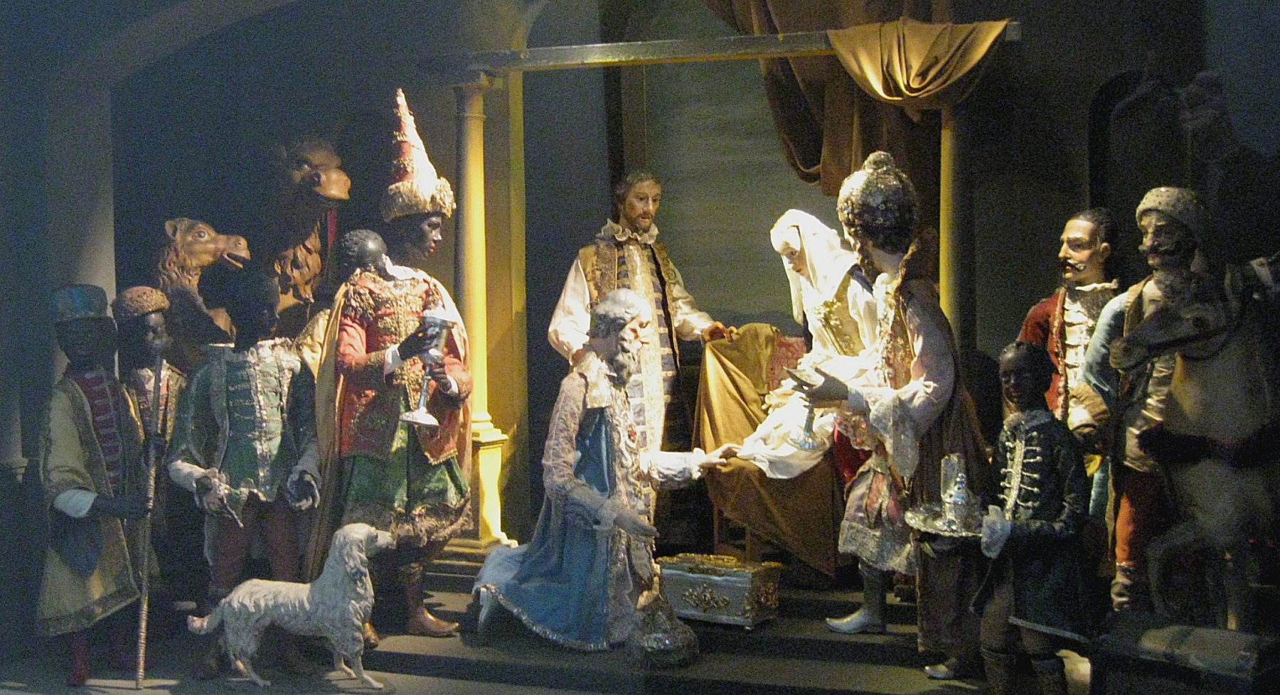 Krippe im Kloster Reisach